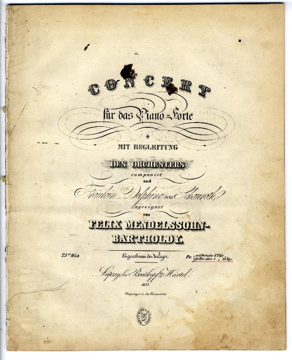 Titelseite von Felix Mendelssohn Bartholdys Klavierkonzert Nr. 1 g-moll Op. 25, 1831, der Pianistin Delphine von Schauroth gewidmet. Leipzig: Breitkopf & Härtel [PN] 5425, ca. 1847 gedruckt. "Concert für das Piano-Forte mit Begleitung des Orchesters componirt und Fräulein Delphine von Schauroth zugeeignet."